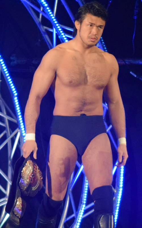 2016年2月11日 大阪府立体育会館 「THE NEW BEGINNING in OSAKA」 柴田勝頼